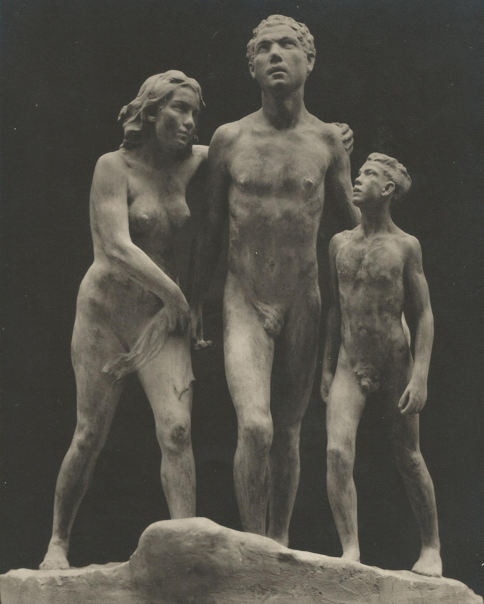 AD MELIORA Júlio Vaz Júnior 1951